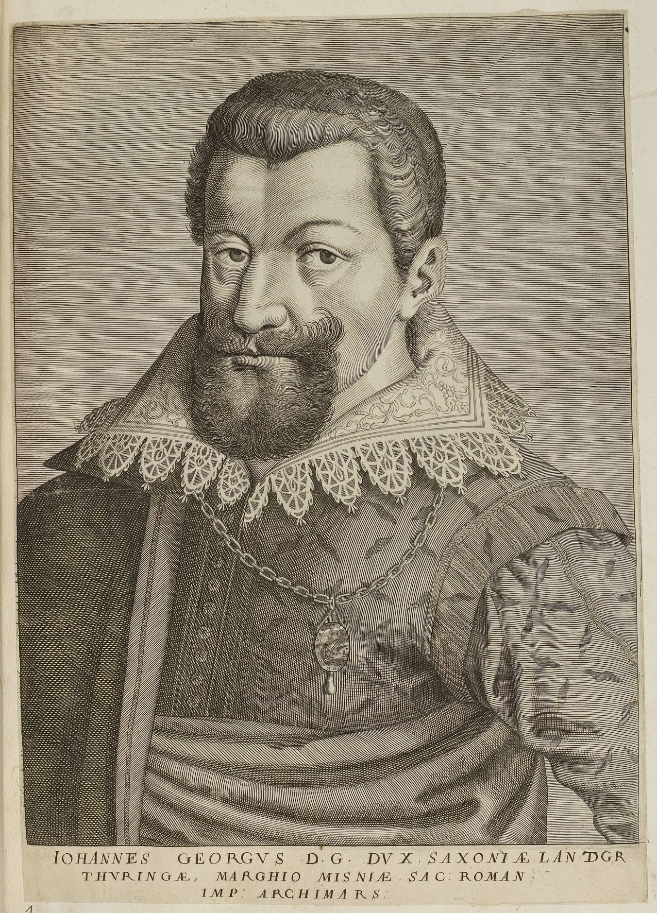 Grafik aus dem Klebeband Nr. 1 der Fürstlich Waldeckschen Hofbibliothek Arolsen Motiv: Kurfürst Johann Georg I. von Sachsen